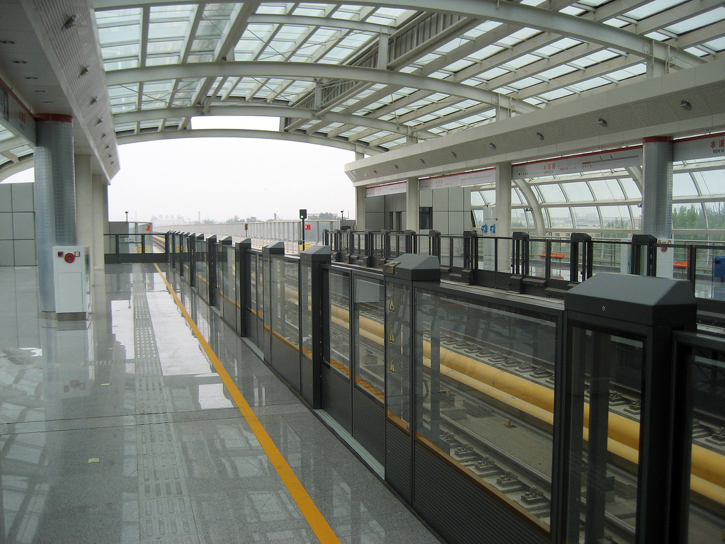 天津地铁地本溪路站